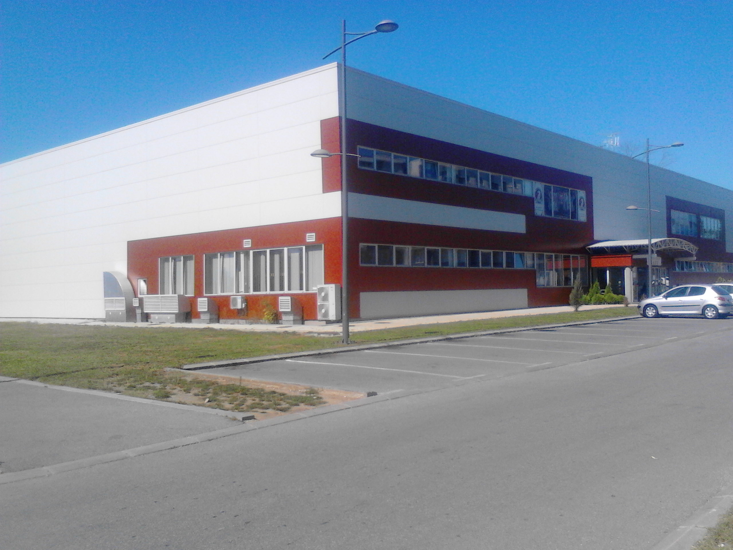 Srpski (latinica): Sportsko-rekreativni centar Park